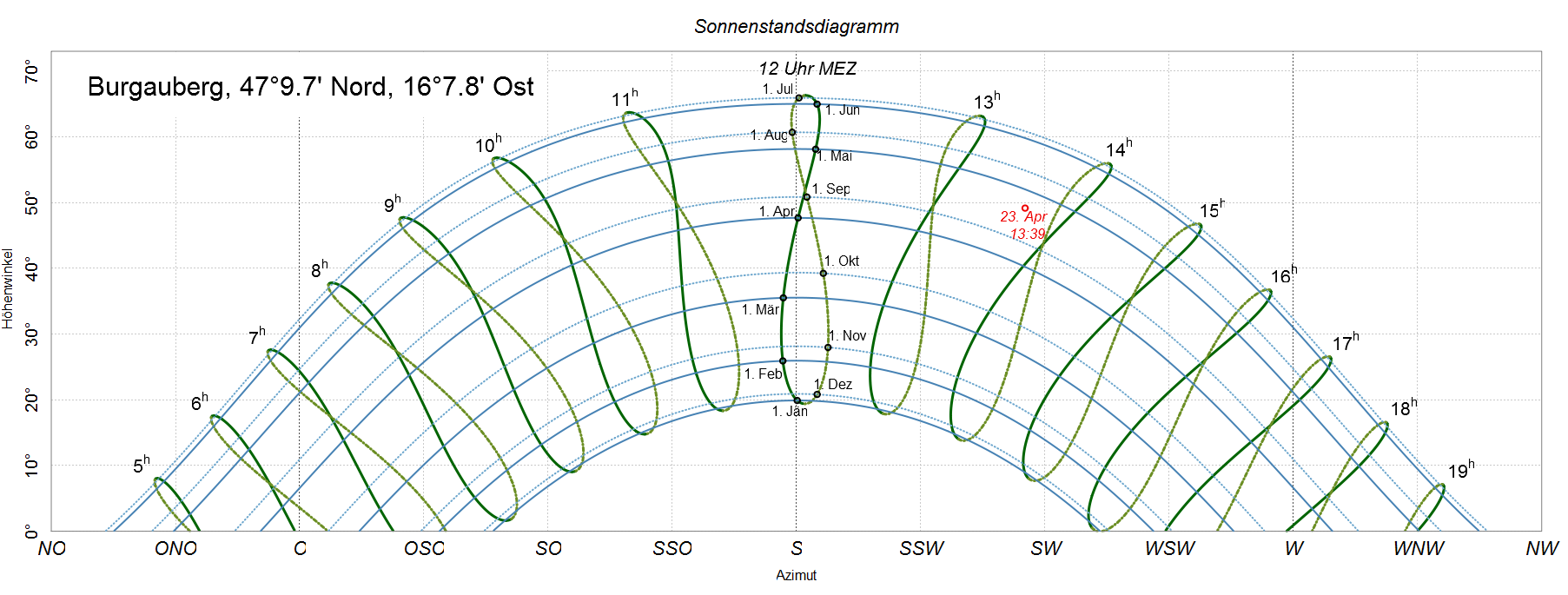 ein Sonnenstandsdiagramm für Burgauberg, es zeigt für alle vollen Stunden den Sonnenstand an sowie für jeden Monatsersten den Tagesbogen. Außerdem wird der Sonnenstand an einem bestimmten Tag zu einem bestimmten Zeitpunkt braun eingezeichnet